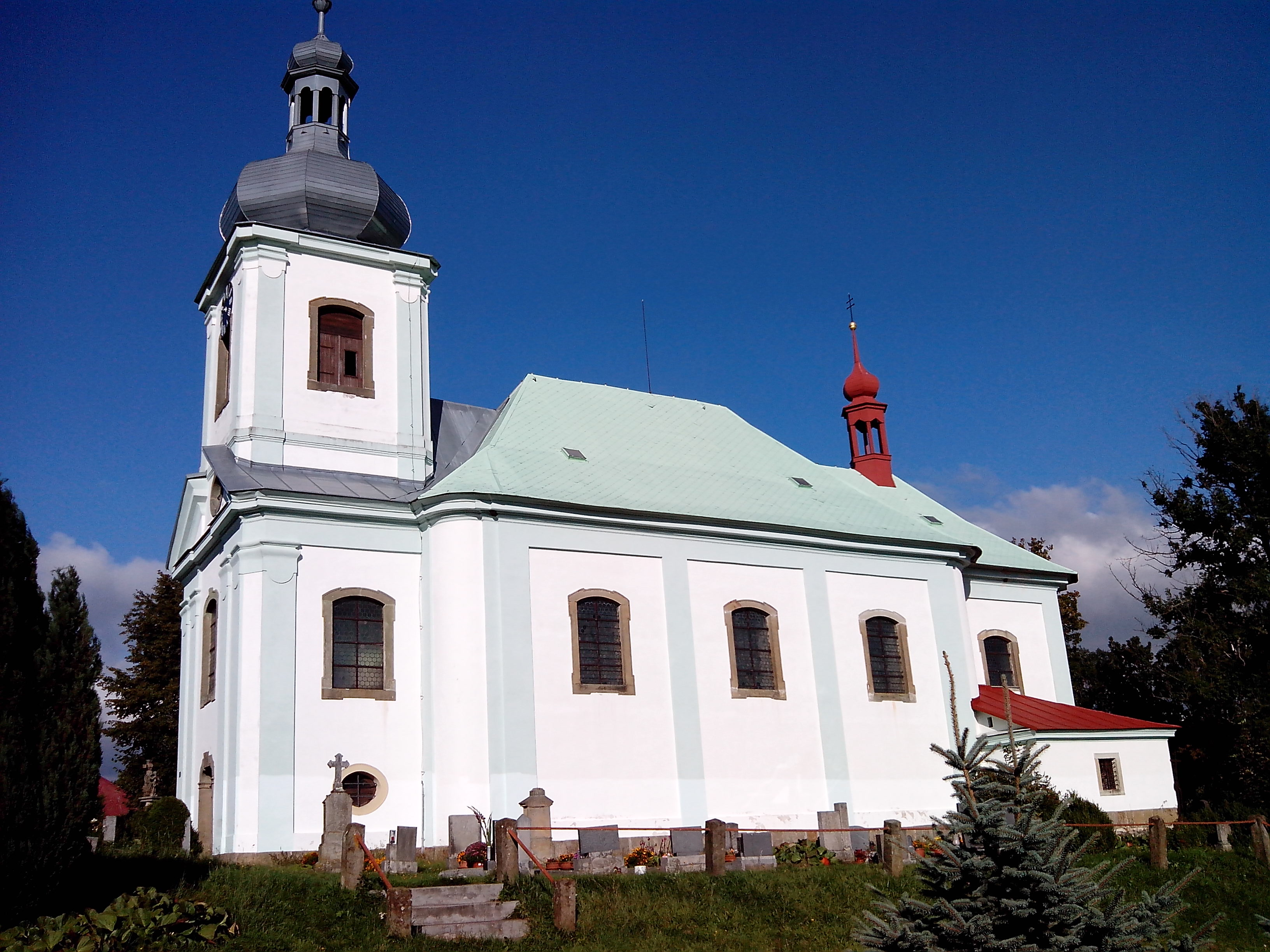 Uhřínov - kostel sv. Vavřince